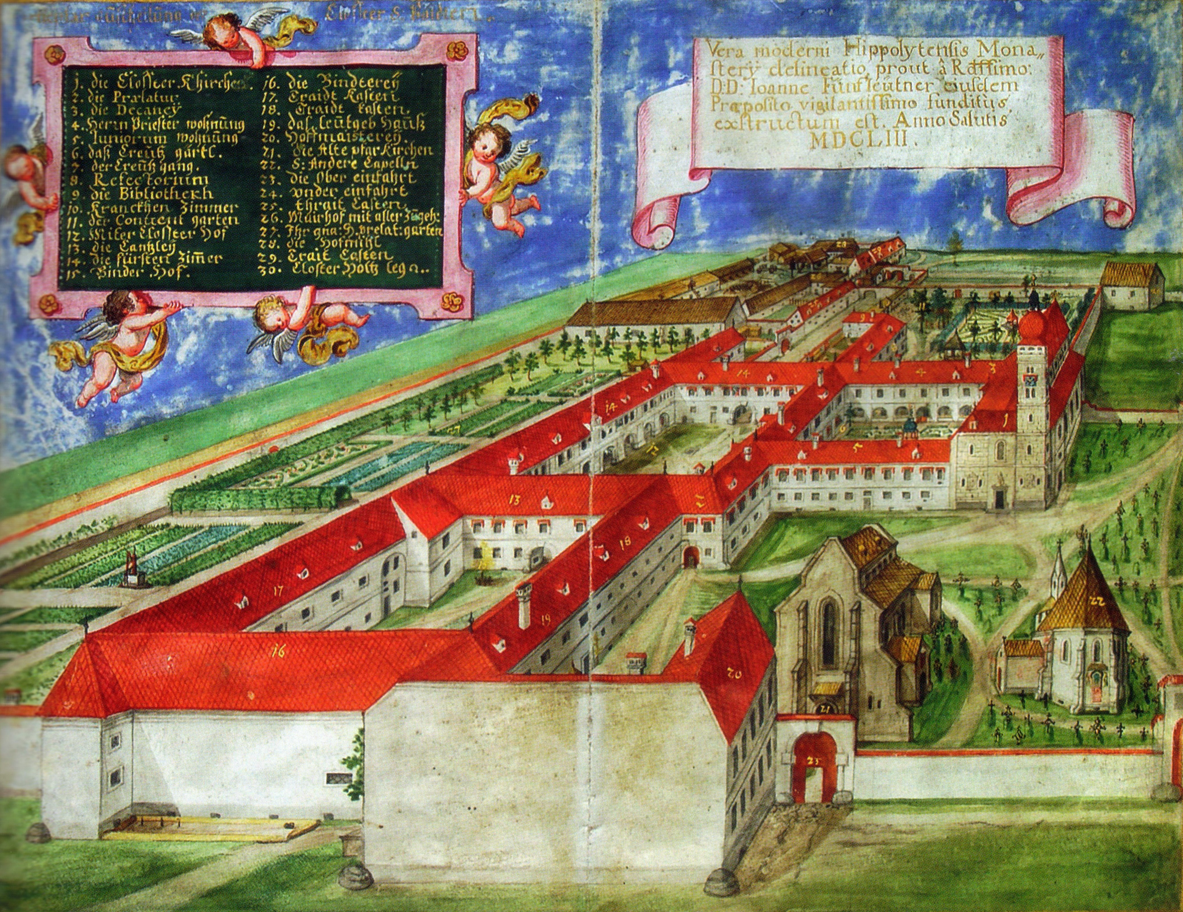 Stift St. Hippolyt mit Friedhof in St. Pölten